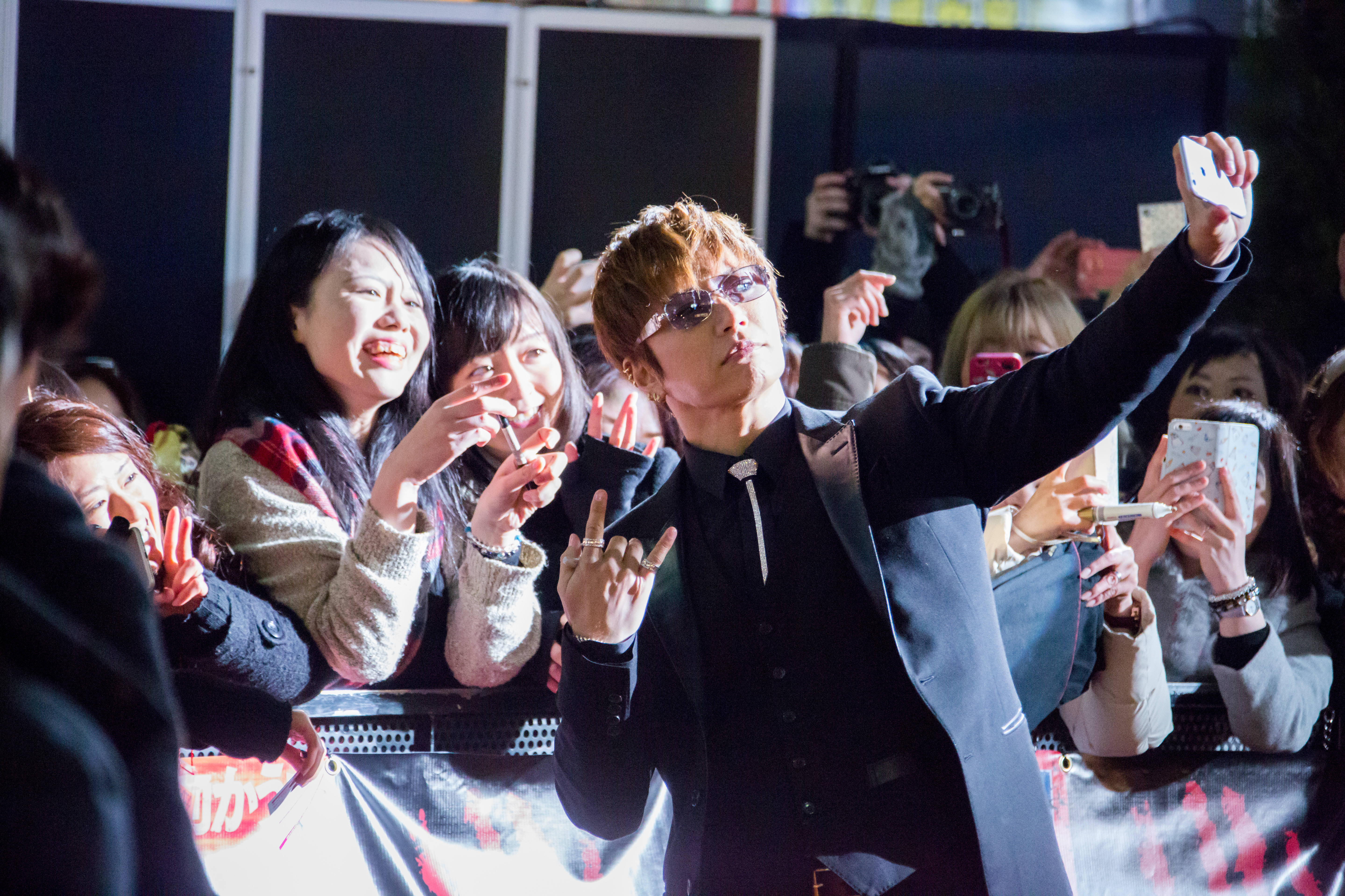 キングコング: 髑髏島の巨神 ジャパンプレミア レッドカーペット GACKT